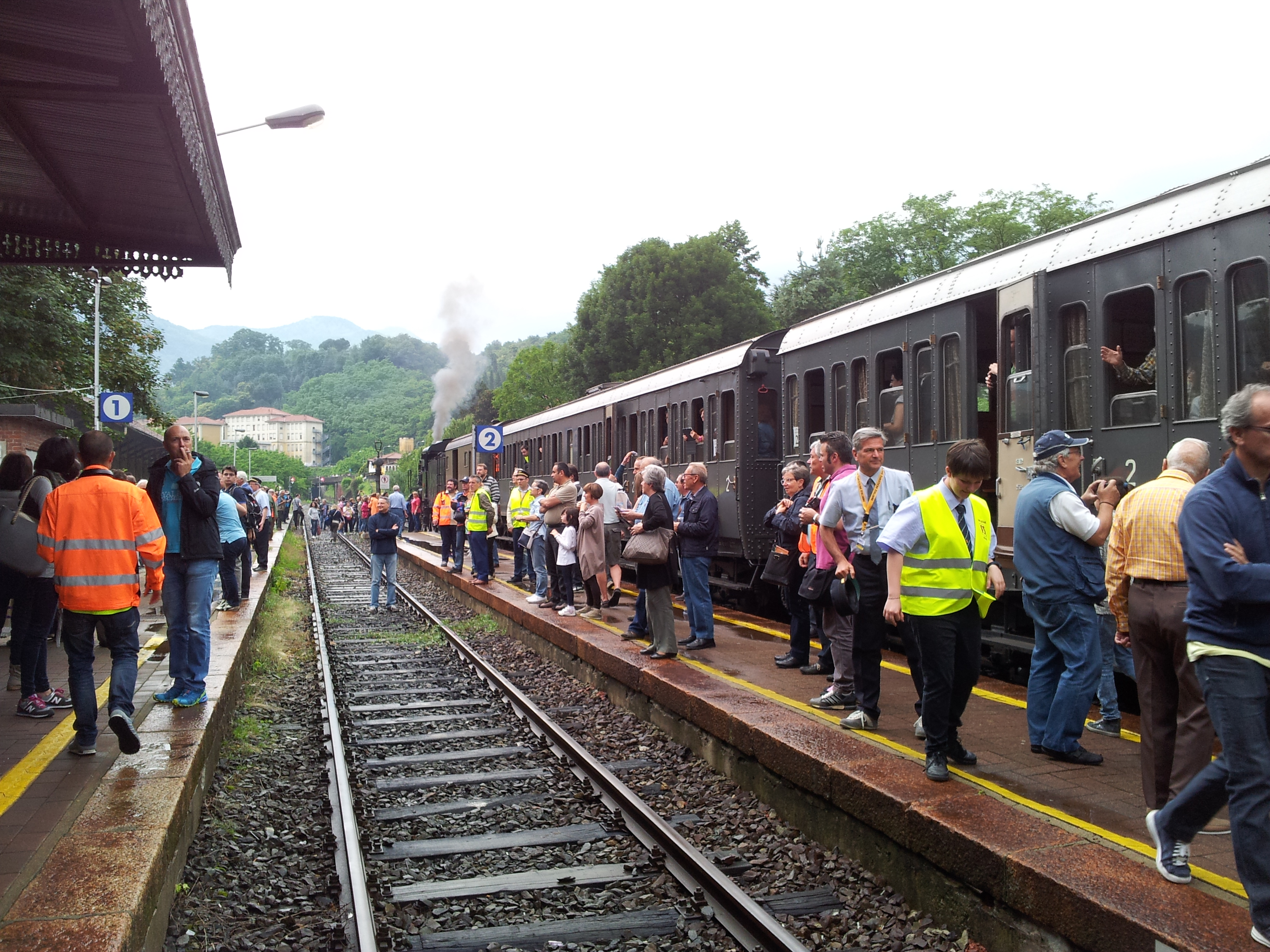 Treno storico, composto dalle carrozze Centoporte a trazione a vapore, in sosta nella stazione di Borgosesia.